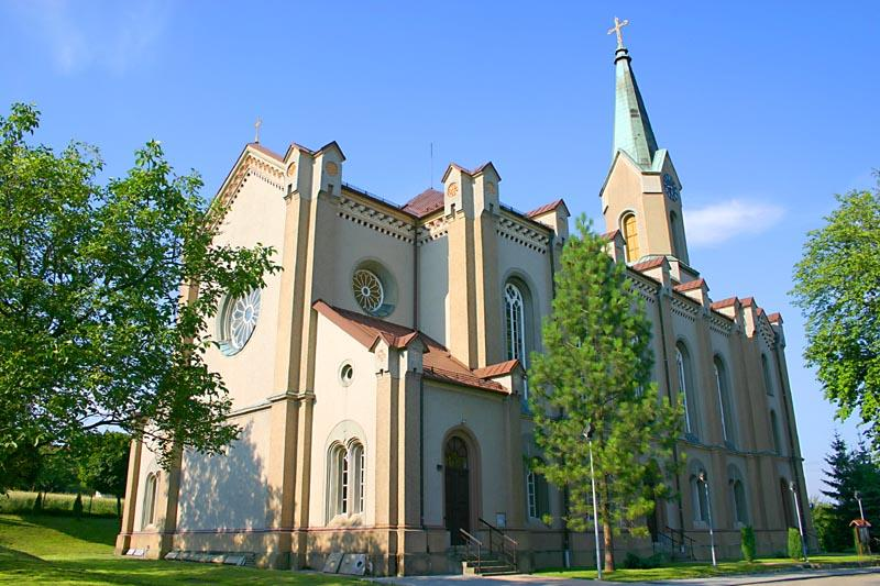 Trinity Church in Skoczów (Polska), Ewangelicko-augsburski kościół św. Trójcy